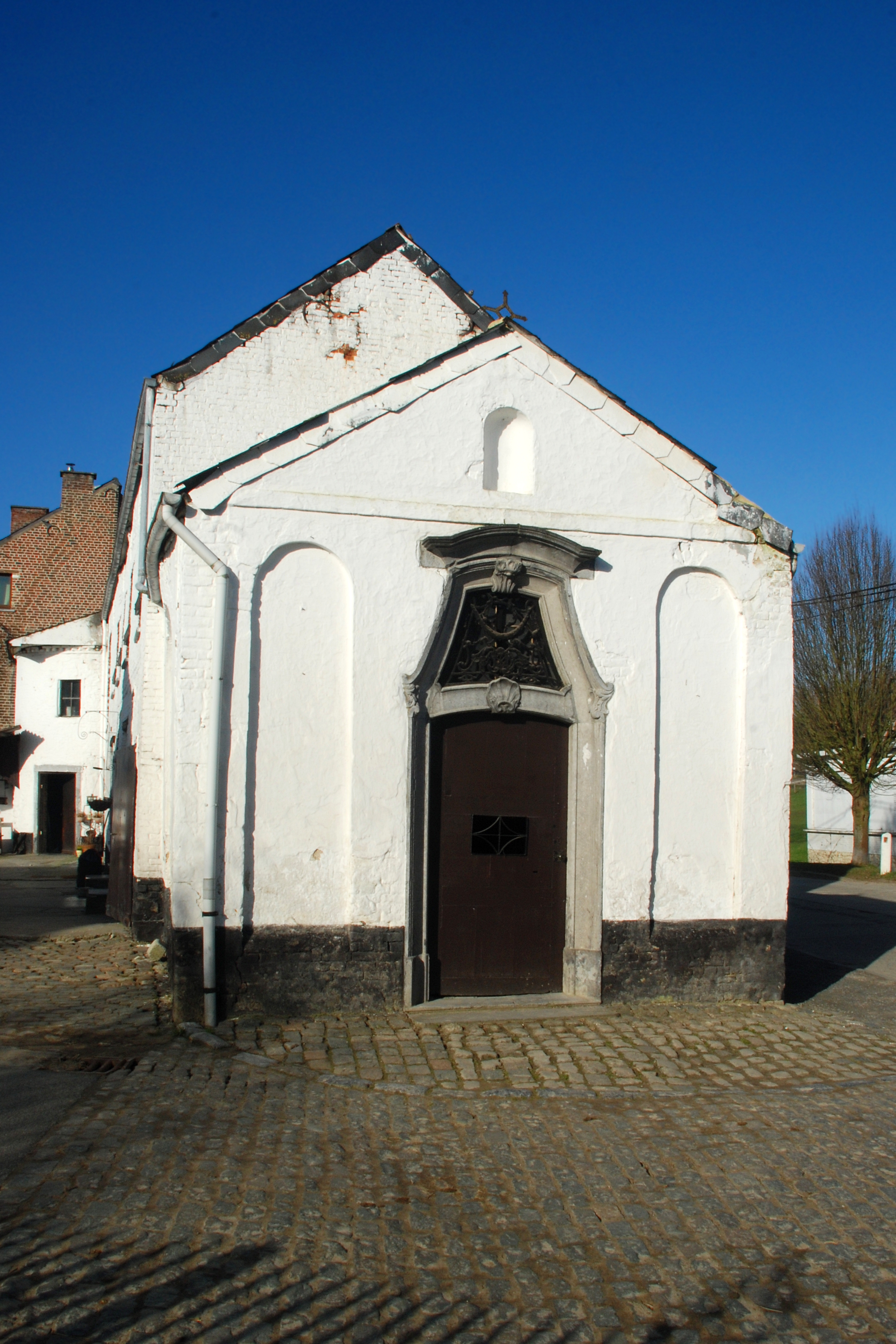 Belgique - Wallonie - Chapelle Notre-Dame des Affligés de Ways